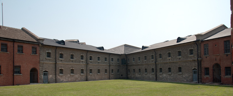 Ehemaliges Russisch-Japanisches Lüshun Gefängnis: Appellplatz im Innehof